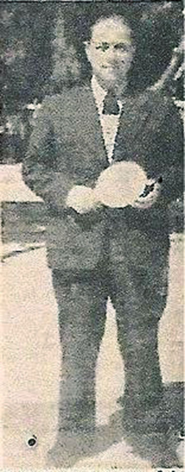 Ο Νίκος Μαντζάρογλου κορυφαία μορφή του τμήματος πινγκ πονγκ του Παναθηναϊκού κατά την προπολεμική περίοδο